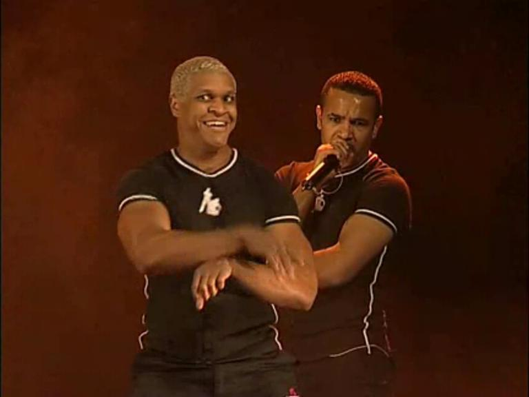 setj